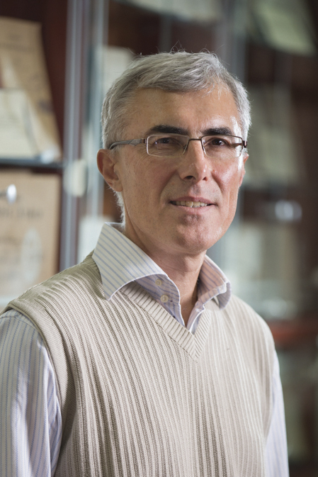 Српски (ћирилица): Сенад Јашаревић